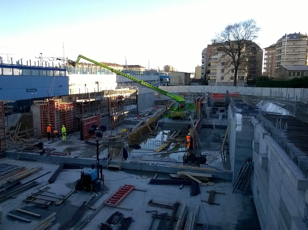 La stazione Forlanini FS della linea M4 a gennaio 2016. Foto di prosugno